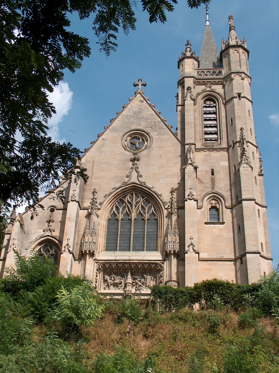 Collégiale de Montmorency en France